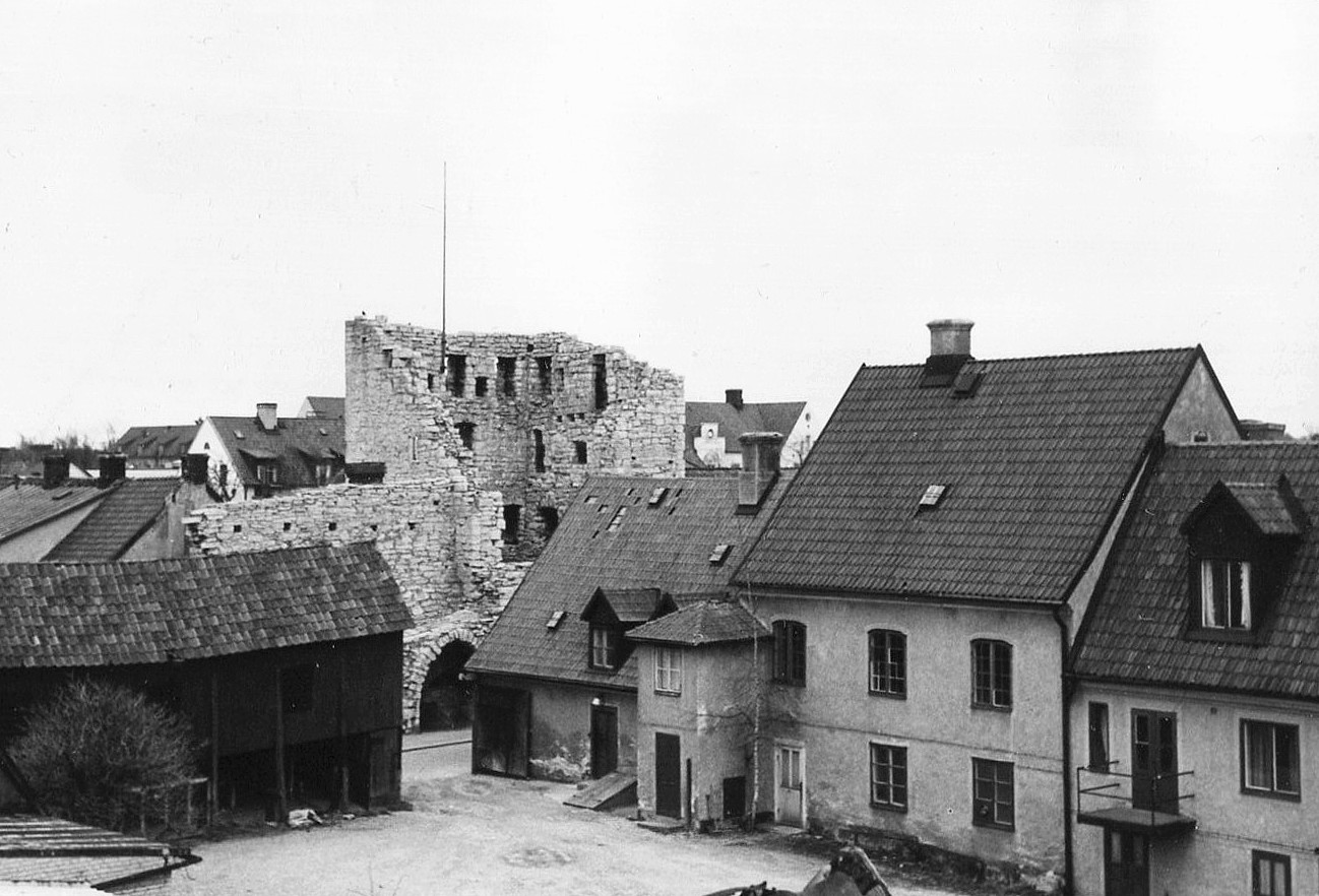 Kvarteret Östertull före rivningen 1970, Österport i bakgrunden.